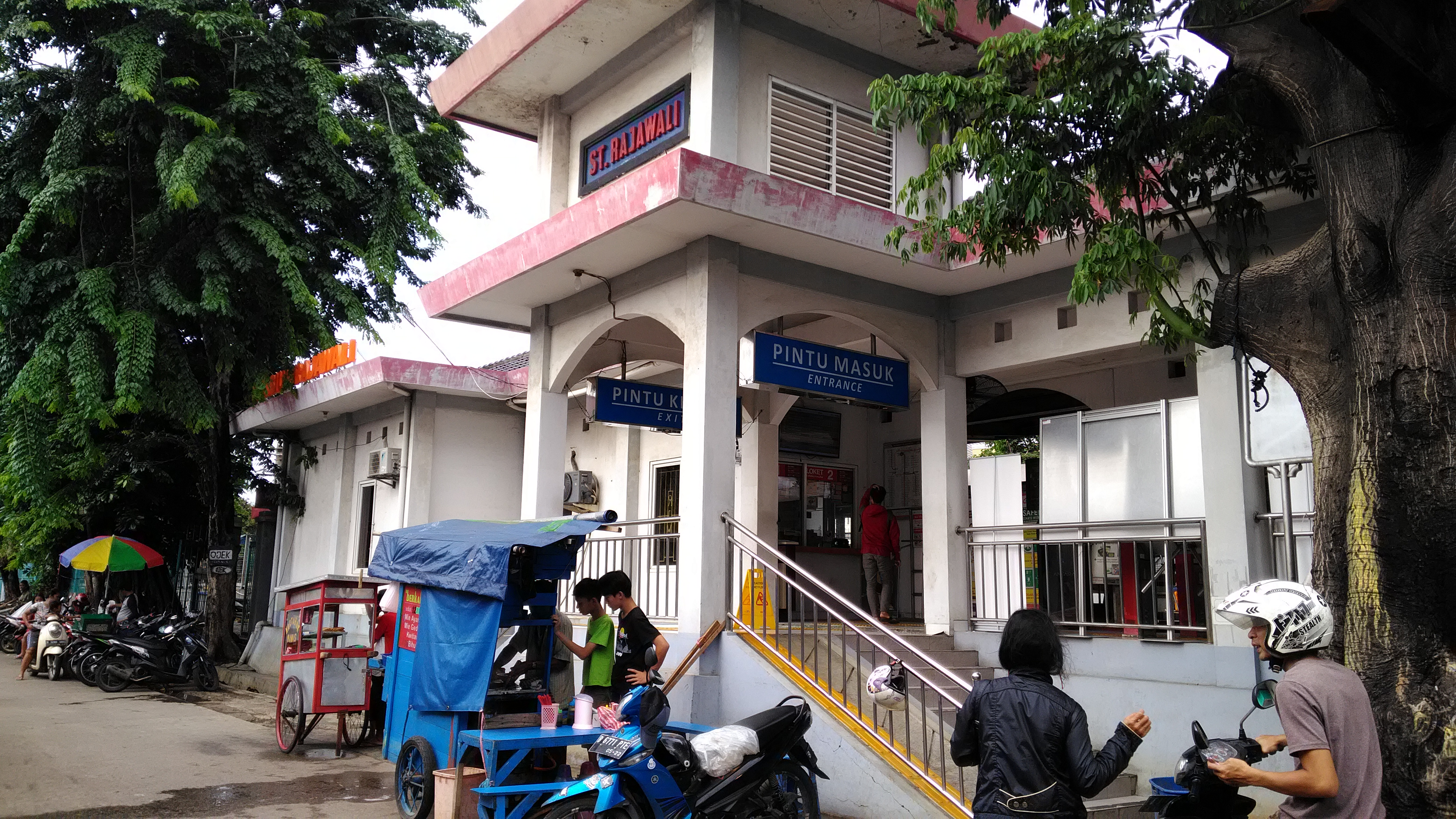 Sunda: Stasion Rajawali, 2020